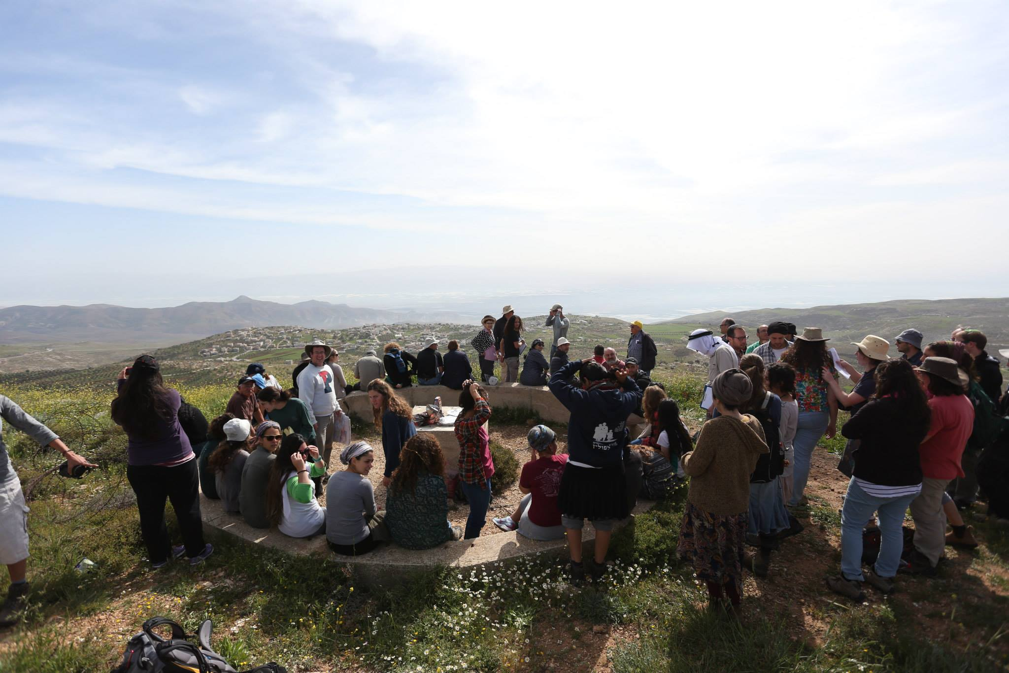 תלמידי המחלקה בסיור לימודי